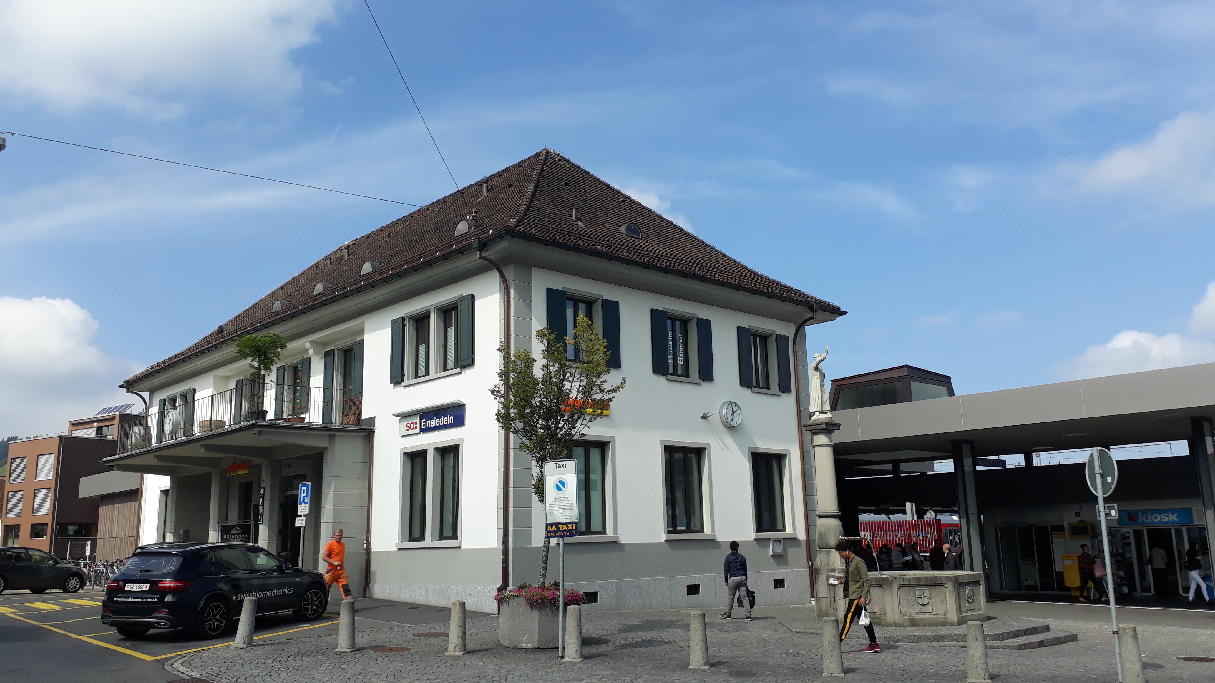 Einsiedeln SZ